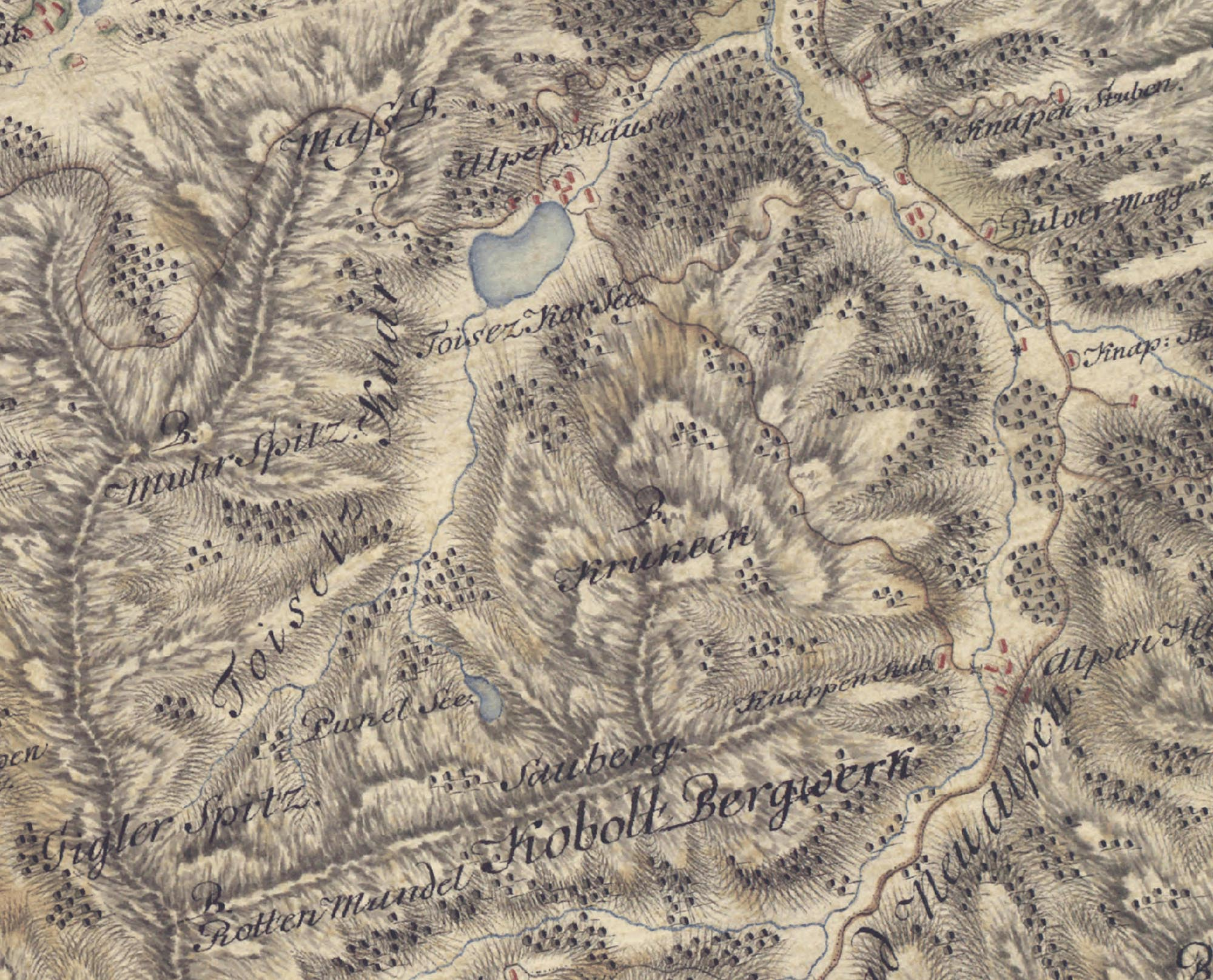 Duisitzkar und Obertal in den Schladminger Tauern in der Josephinischen Landesaufnahme